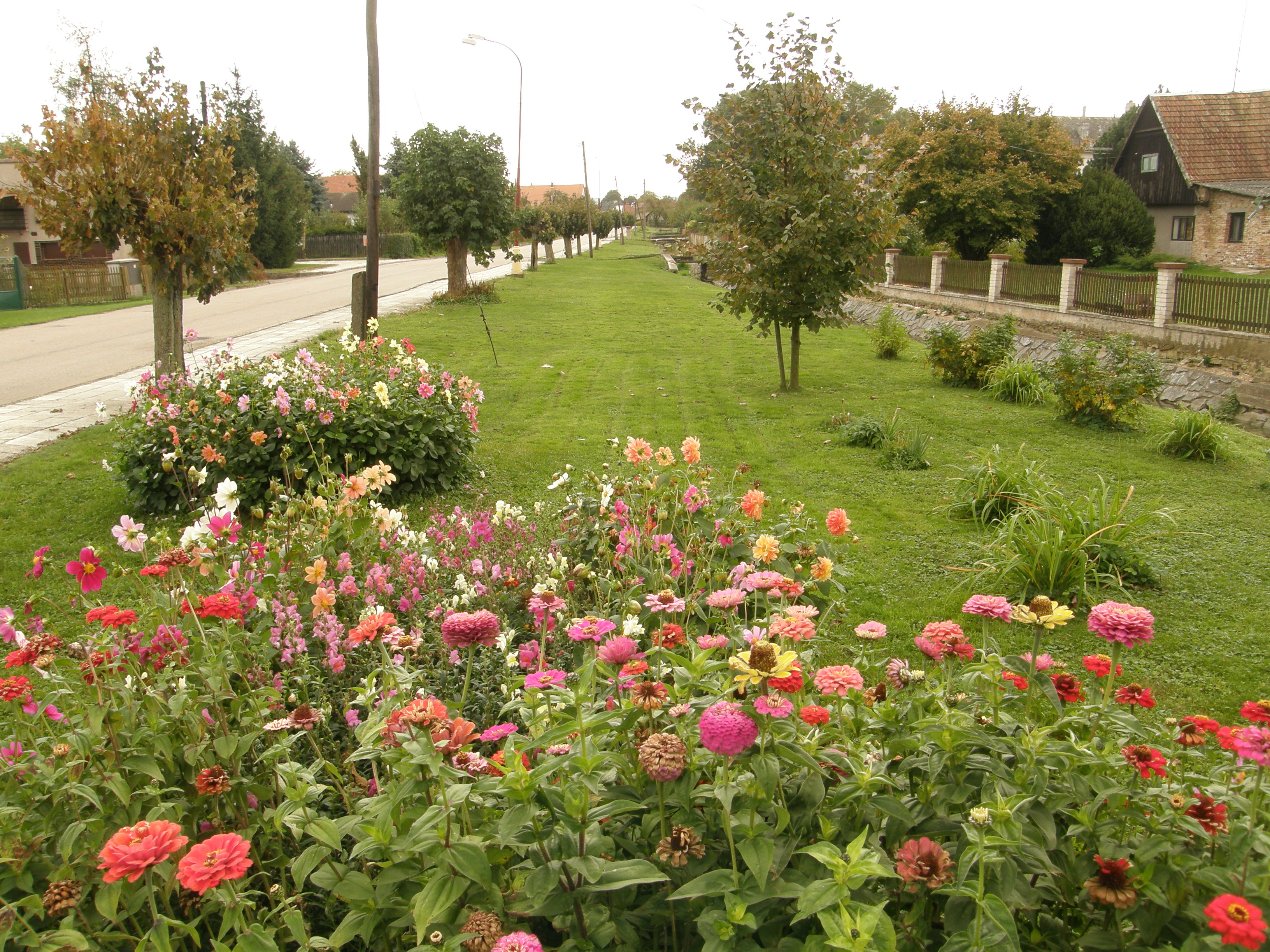 Obec Mokré - náves